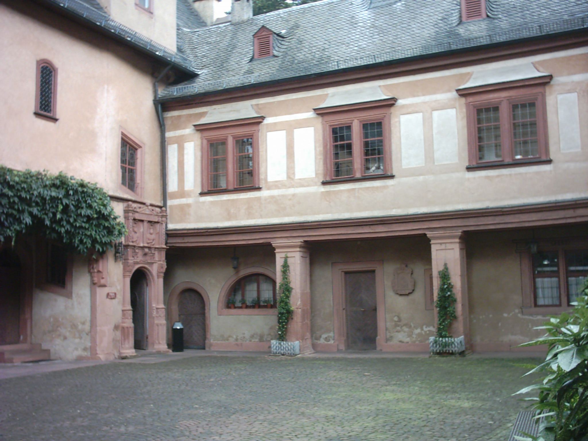 Schloss Mespelbrunn im Spessart, Ostflügel Fotograf: presse03, selbst fotografiert 2005 Lizenz: GNU-FDL